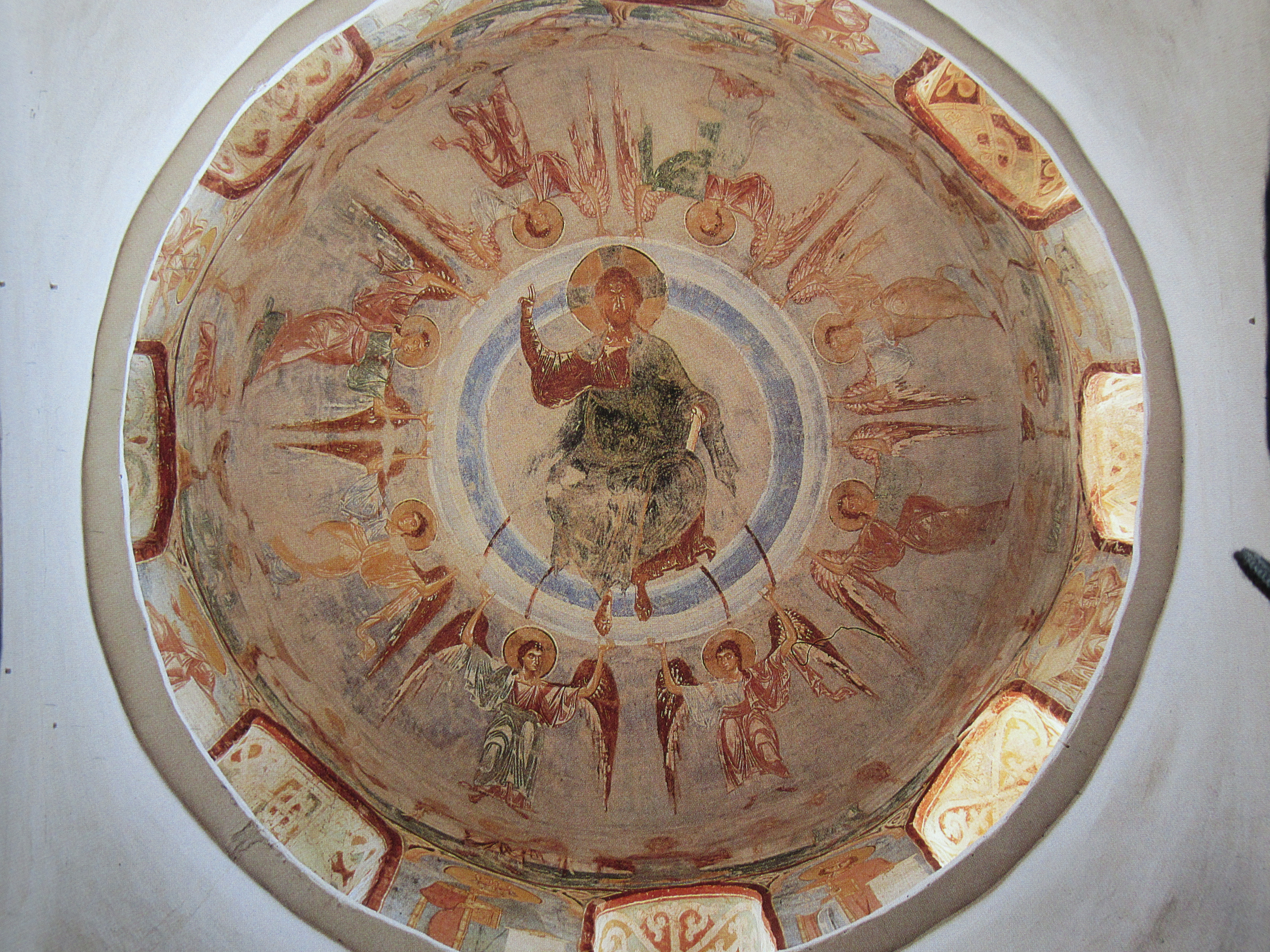 église Saint-Georges coupole 1167 (Staraïa Ladoga)